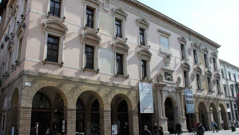 Palacio Bo